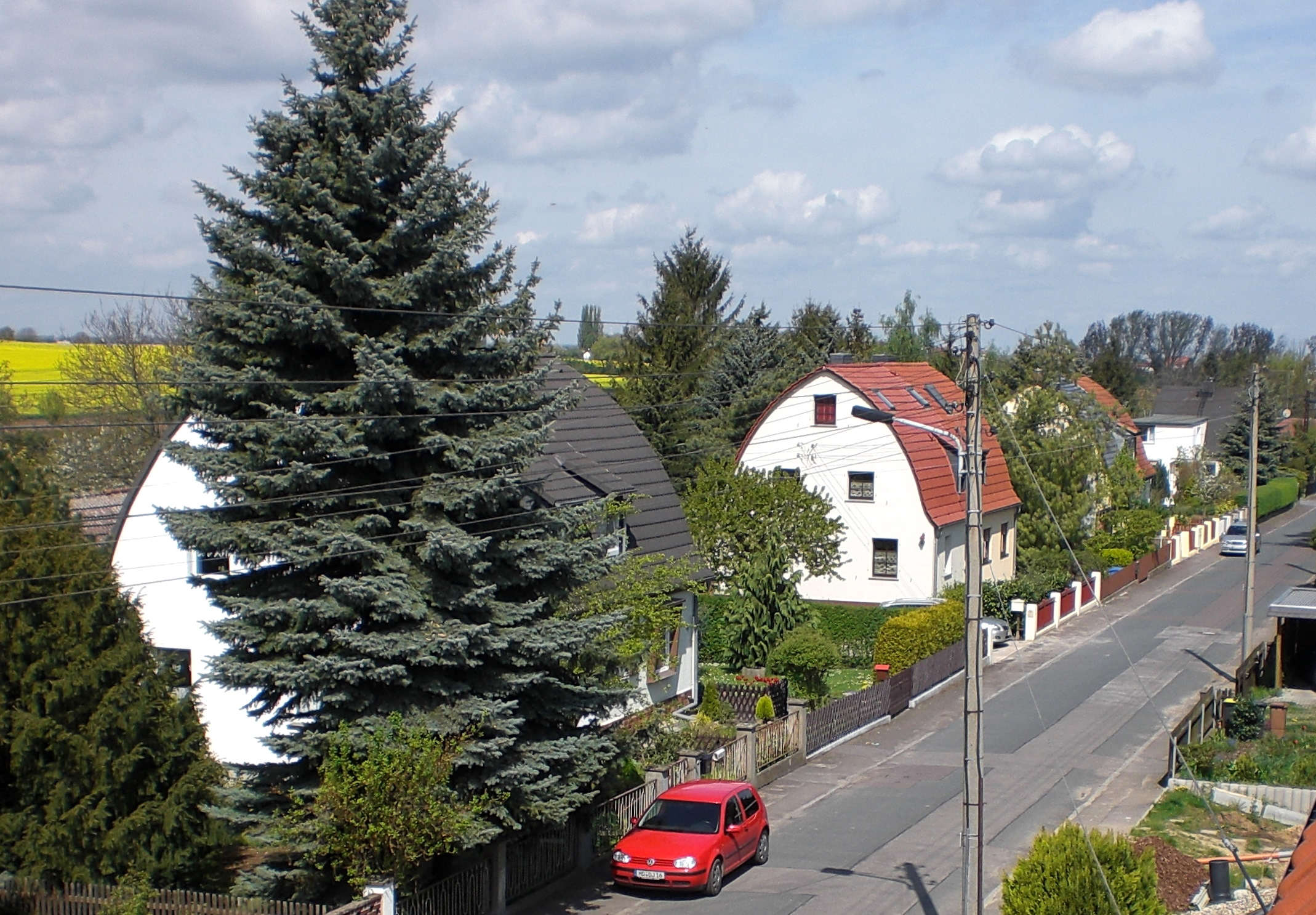 Blick auf die Mitte der Arnold-Knoblauch-Straße